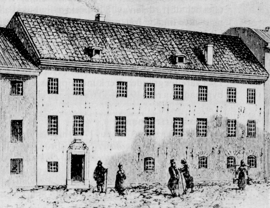 Stockholms trivialskola på Själagårdsgatan (tidigare Själagården)